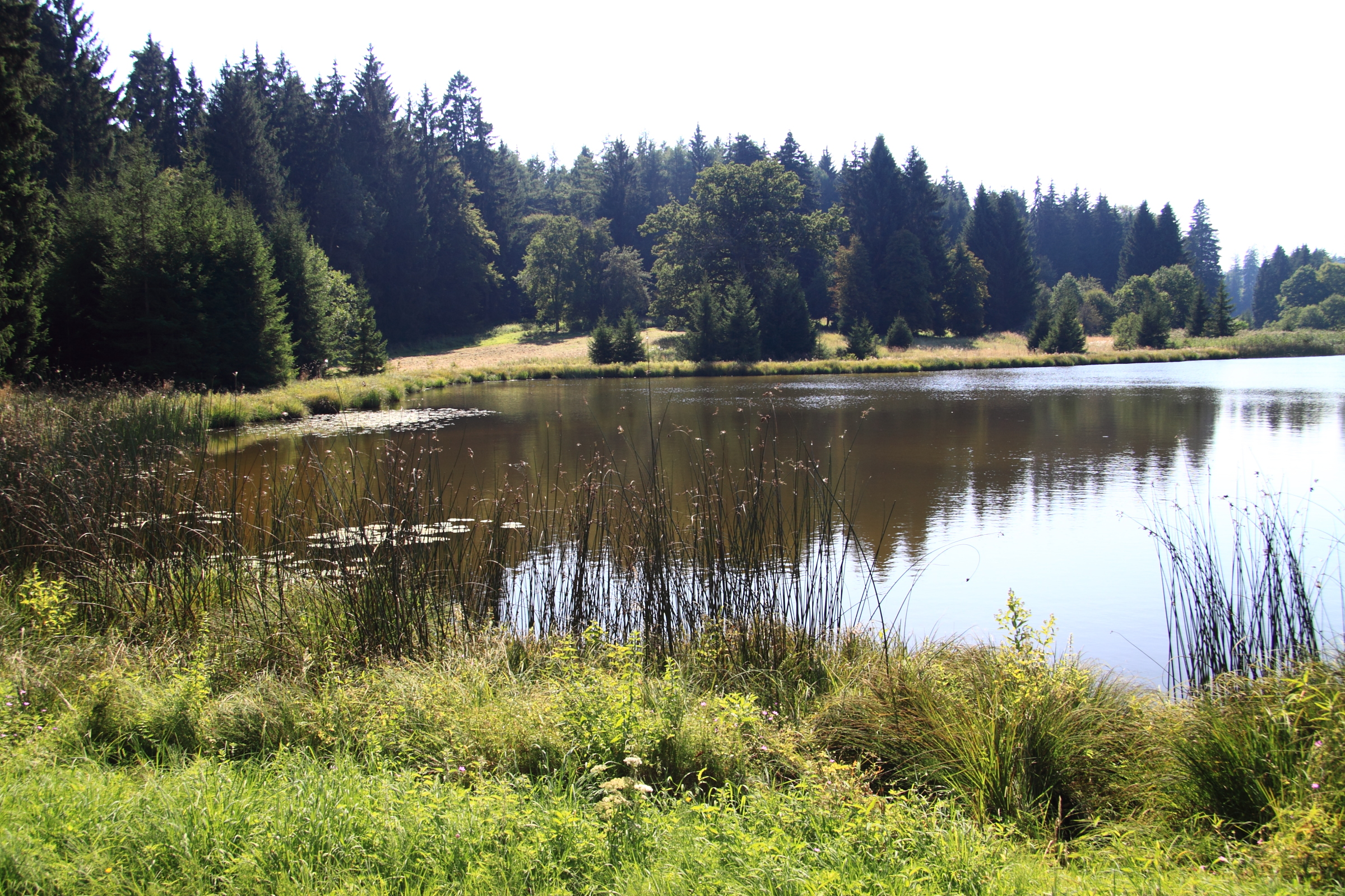 Ablacher Weiher im Wildpark Josefslust bei Sigmaringen